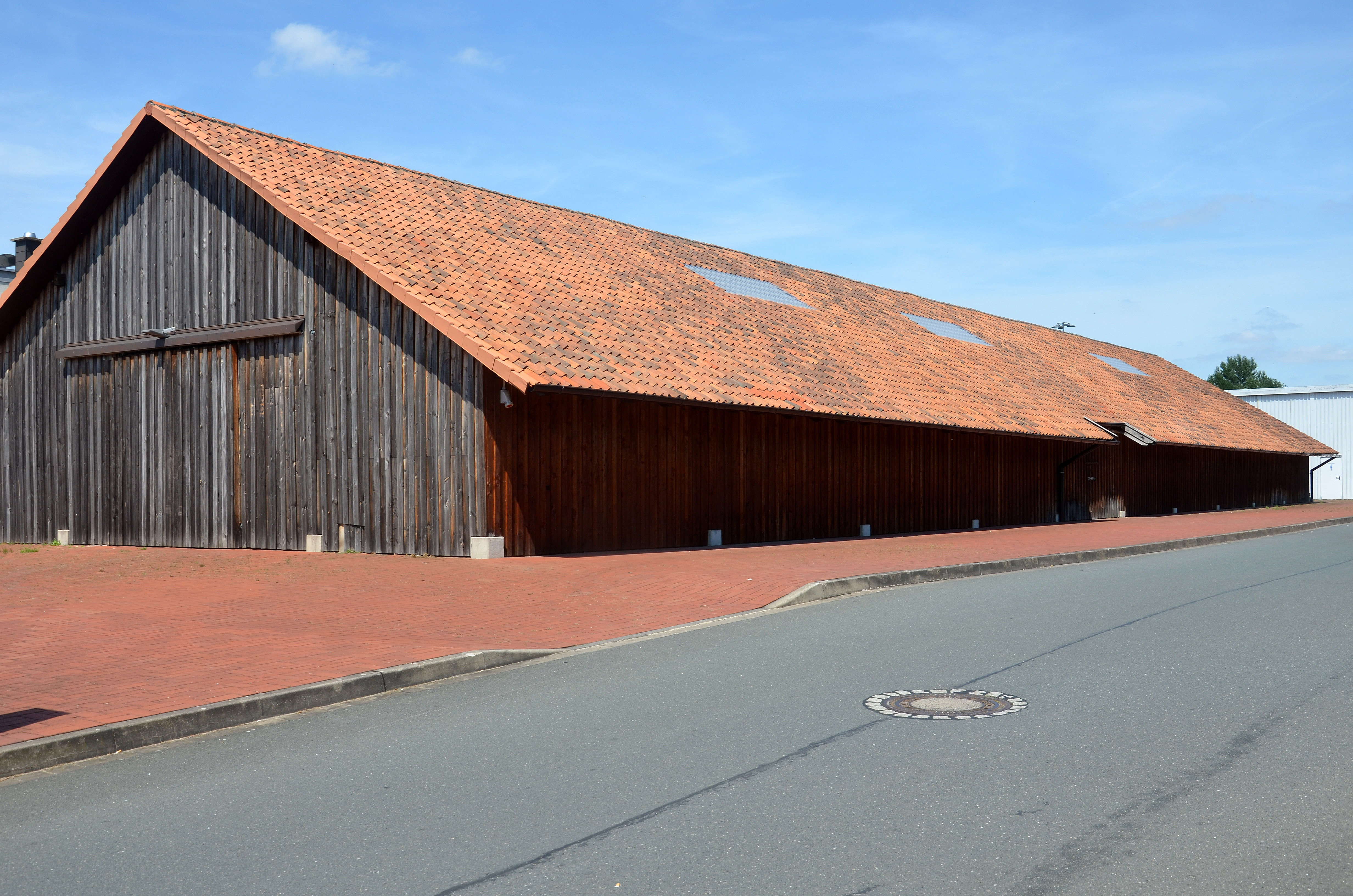 Während einer Fahrrad-Exkursion von Mitarbeitern des Wikipedia-Büros Hannover nach Resse in der Wedemark entstand dieses Foto des auf dem Gelände des Möbelhauses Möbel Hesse an der Robert-Hesse-Straße zwecks Umnutzung zu Veranstaltungszwecken wieder aufgebauten Trockenschuppens für Ziegelsteine der ehemaligen Flemmingschen Tonkuhle in Berenbostel, einem Stadtteil von Garbsen ...